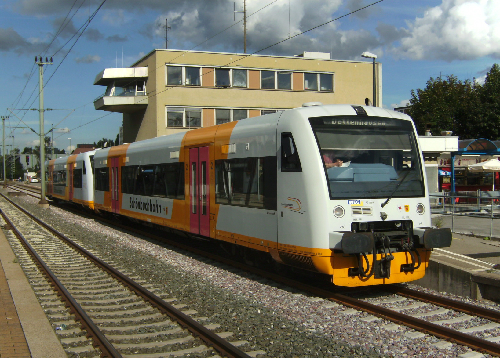 Ein Regioshuttle der Schönbuchbahn im Umsteigebahnhof Böblingen an der Gäubahn